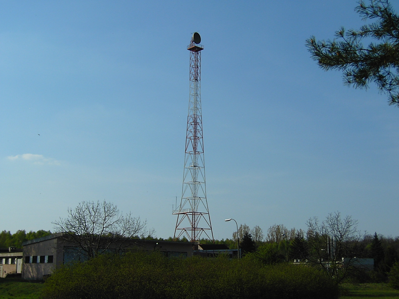 Maszt z anteną radiolinii w b. Radiofonicznym Ośrodku Nadawczym w Konstantynowie k/ Gąbina.